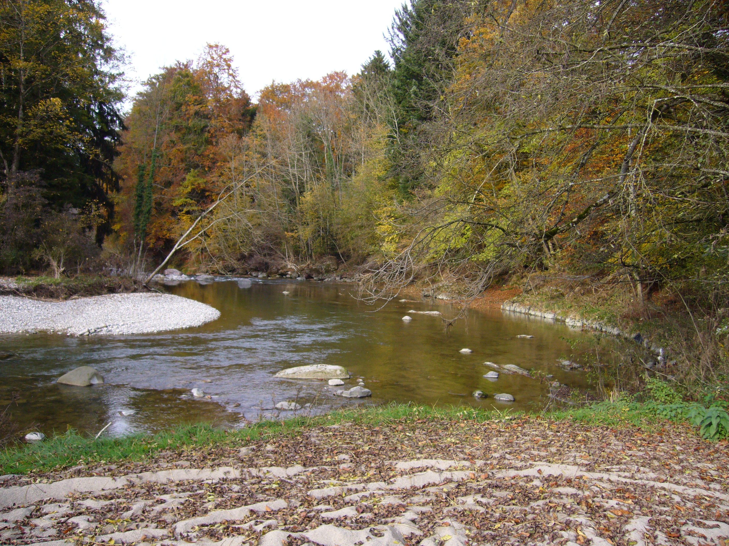 Sihl oberhalb von Sihlbrugg